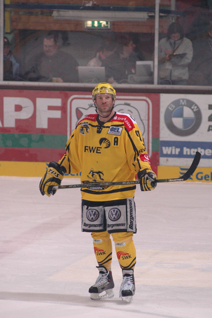 Alexander Seliwanow im Trikot der Krefeld Pinguine 2006